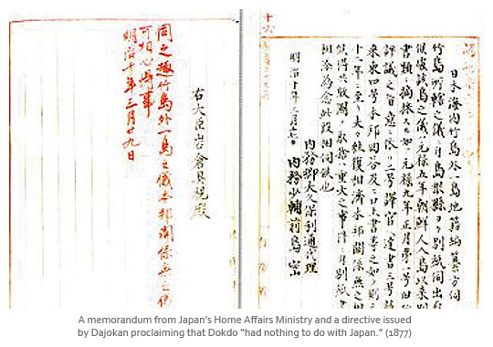 Le document Murakami (Contentieux sur les rochers Liancourt)